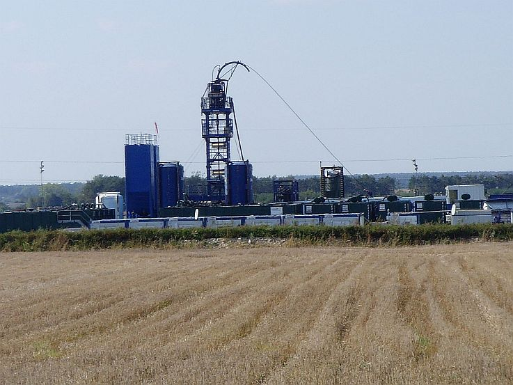 Stacja wiertnicza gazu łupkowego we wsi Krynica w powiecie krasnostawskim w województwie lubelskim. Fotografia wykonana przez Dominikę w trakcie rajdu pełzakowego (Beata, Dominika, Karol) po powiecie krasnostawskim.